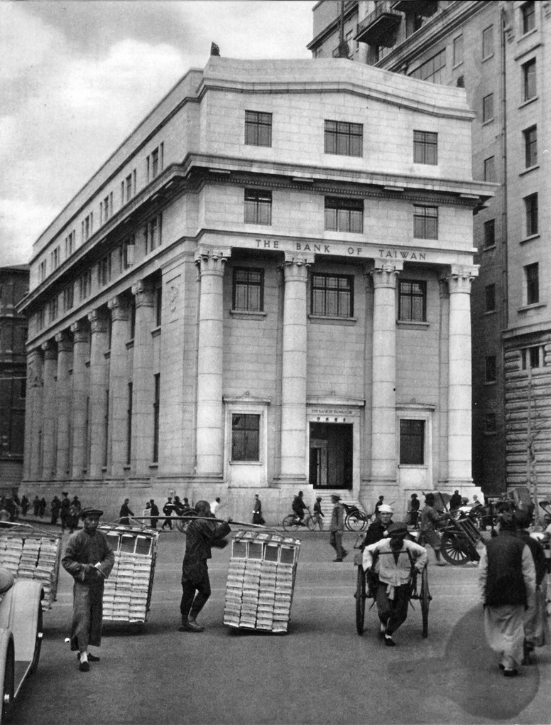 中文（中国大陆）: 上海外滩台湾银行大楼旧照